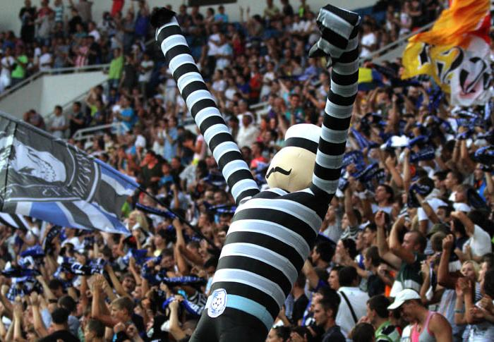 Талисман ФК «Черноморец» (Одесса) «одесский моряк» на трибуне стадиона «Черноморец» в г. Одессе.